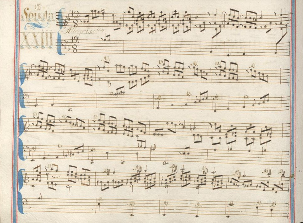 La sonate K. 120, telle qu'elle se présente dans le manuscrit de Venise, volume XV no. 23.